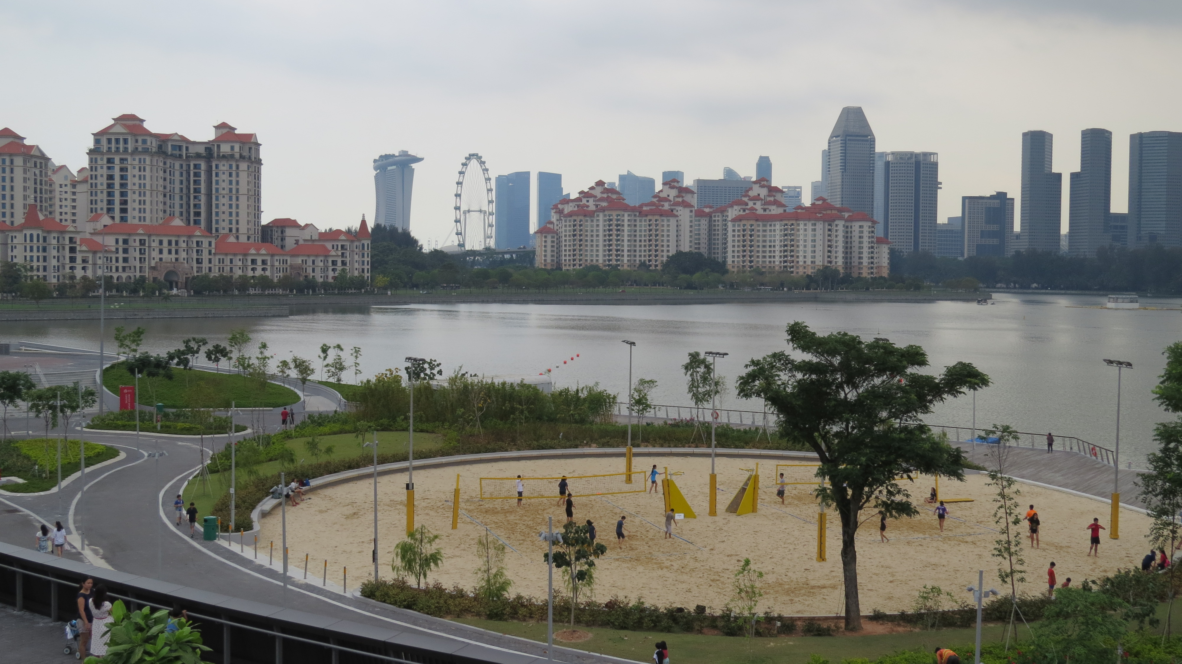 Stadium Park